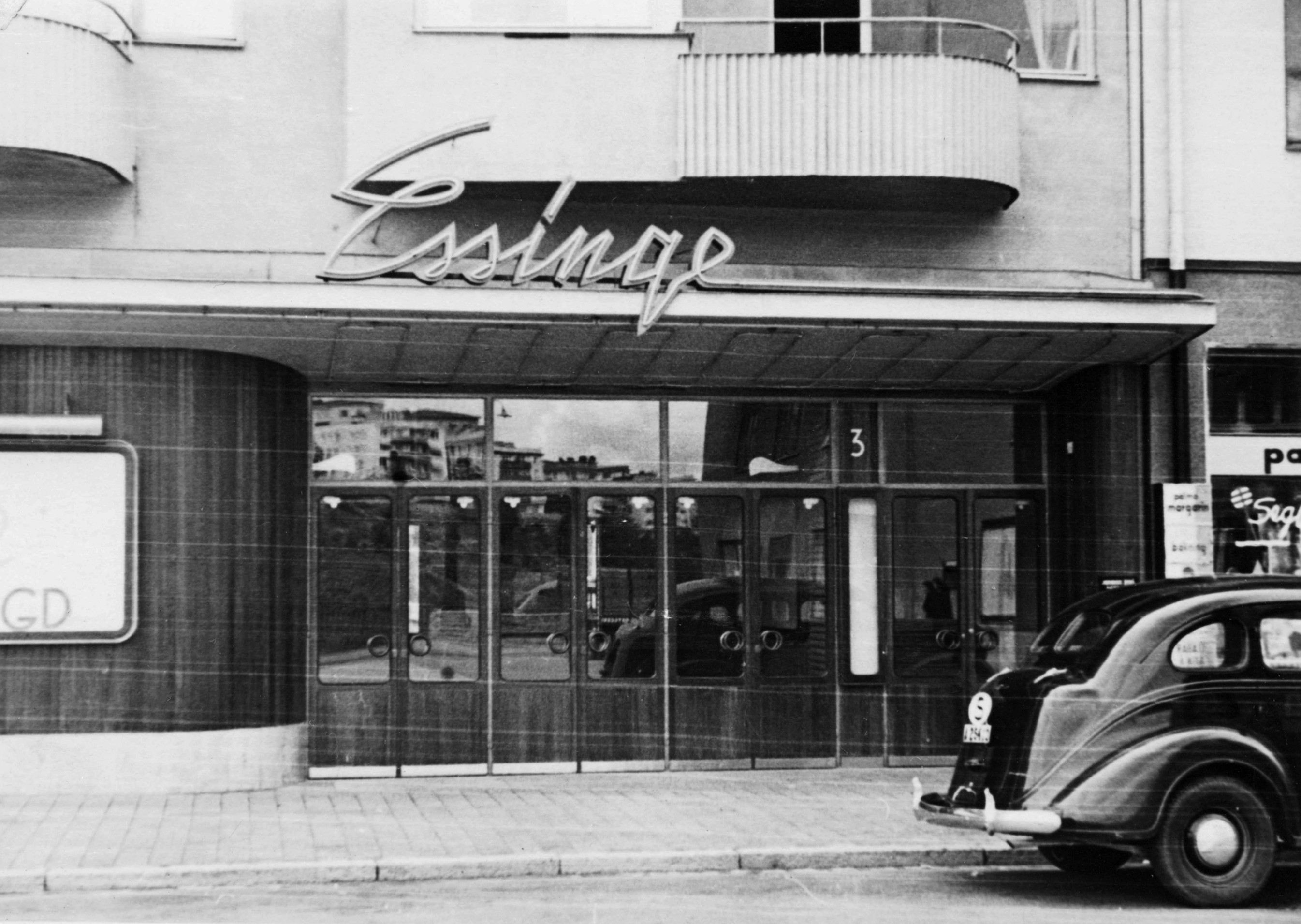 Essinge-Bio, arkitekt Björn Hedwall